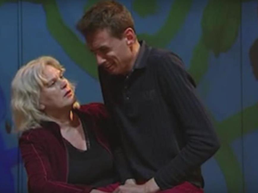 Deze dvd is gemaakt naar aanleiding van de Friese theatervoorstelling "Rake Klappen". Rake Klappen is gemaakt in samenwerking met Tryater, Fier Fryslân, Advies en Meldpunt Kindermishandeling en Regiopolitie Fryslân. Spelers : Marijke Geertsma, Theun Plantinga